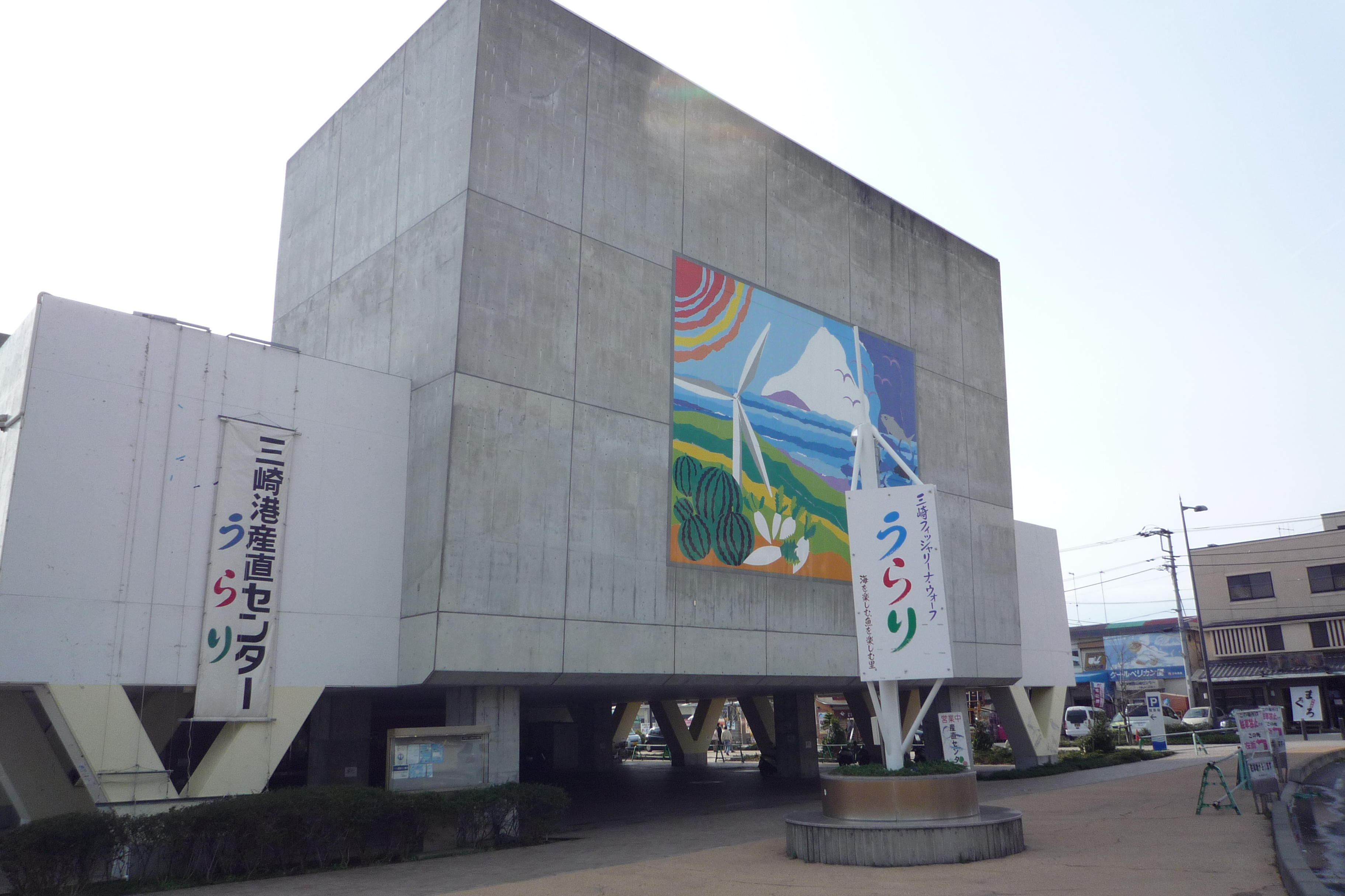 三崎の産直センターを撮影。